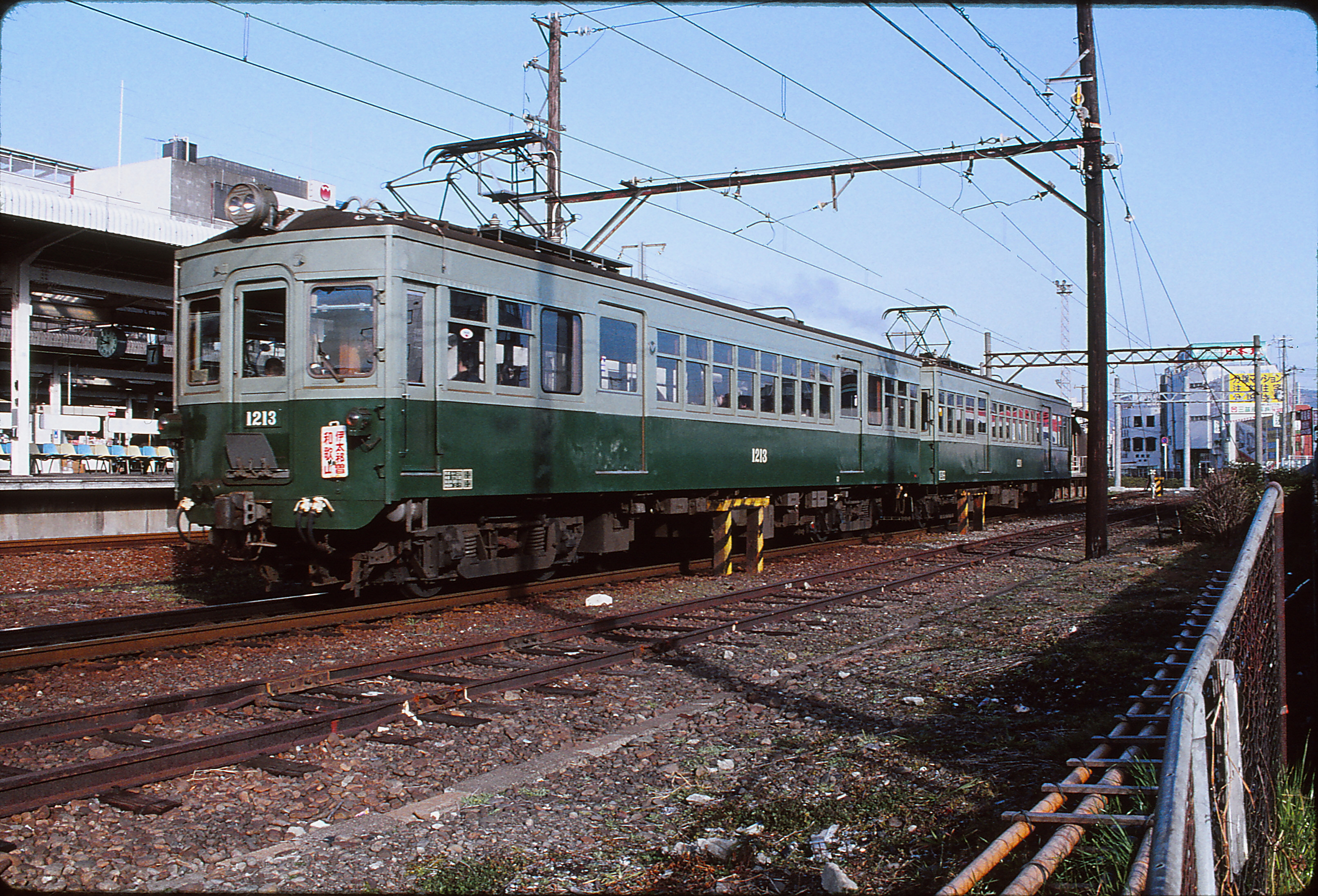 南海貴志川線 和歌山駅